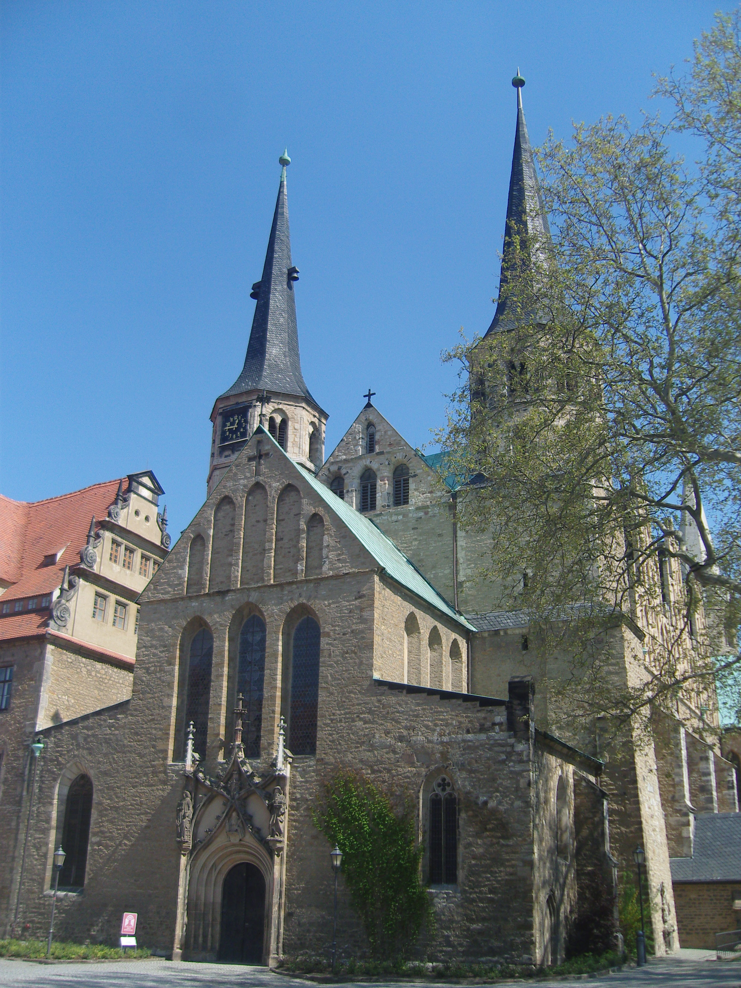 Merseburger Dom